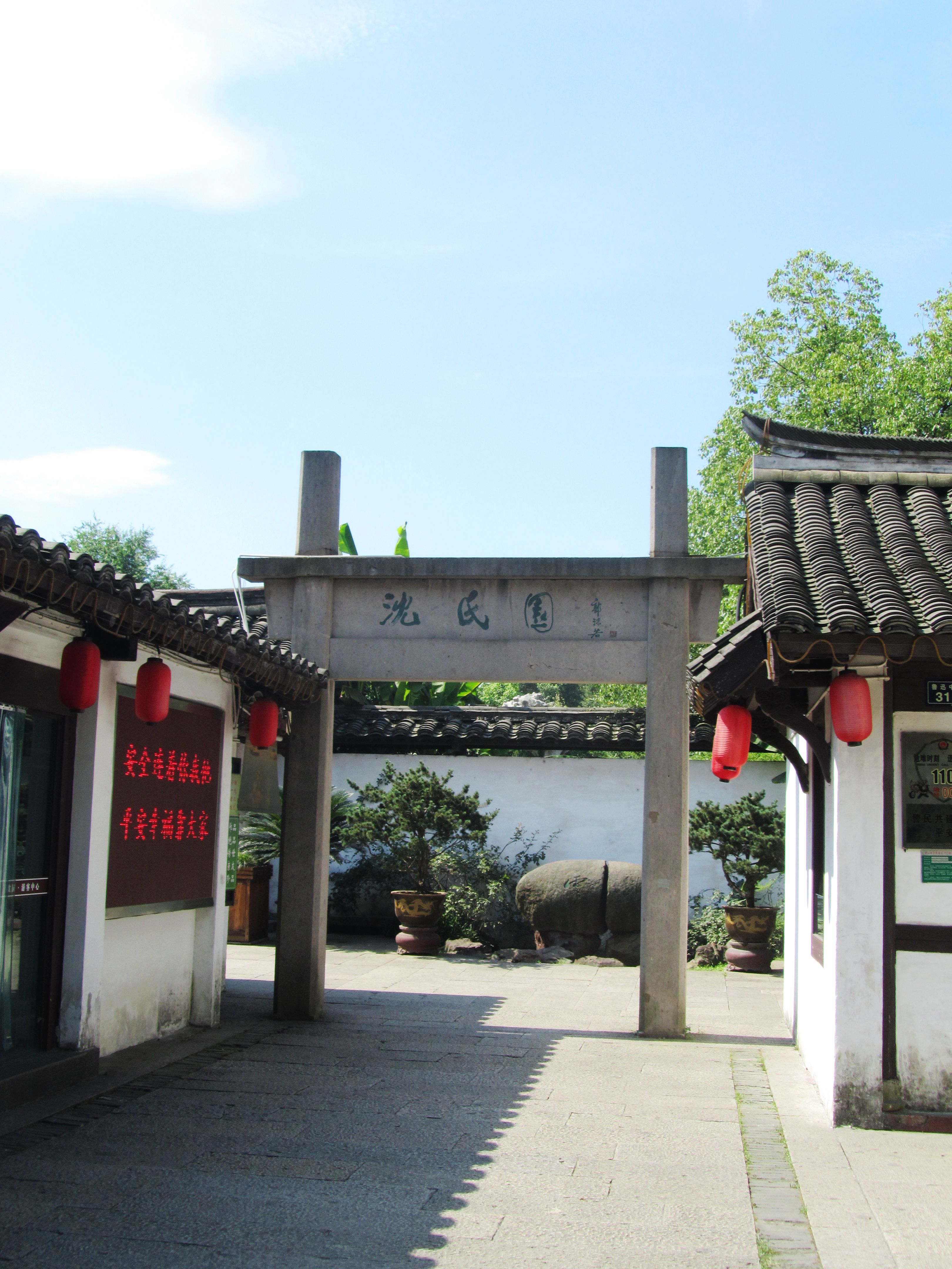 绍兴沈氏园北门。